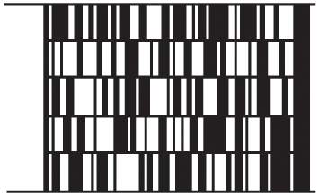 Code 49, Quelle Barcodat "2D-Fibel"